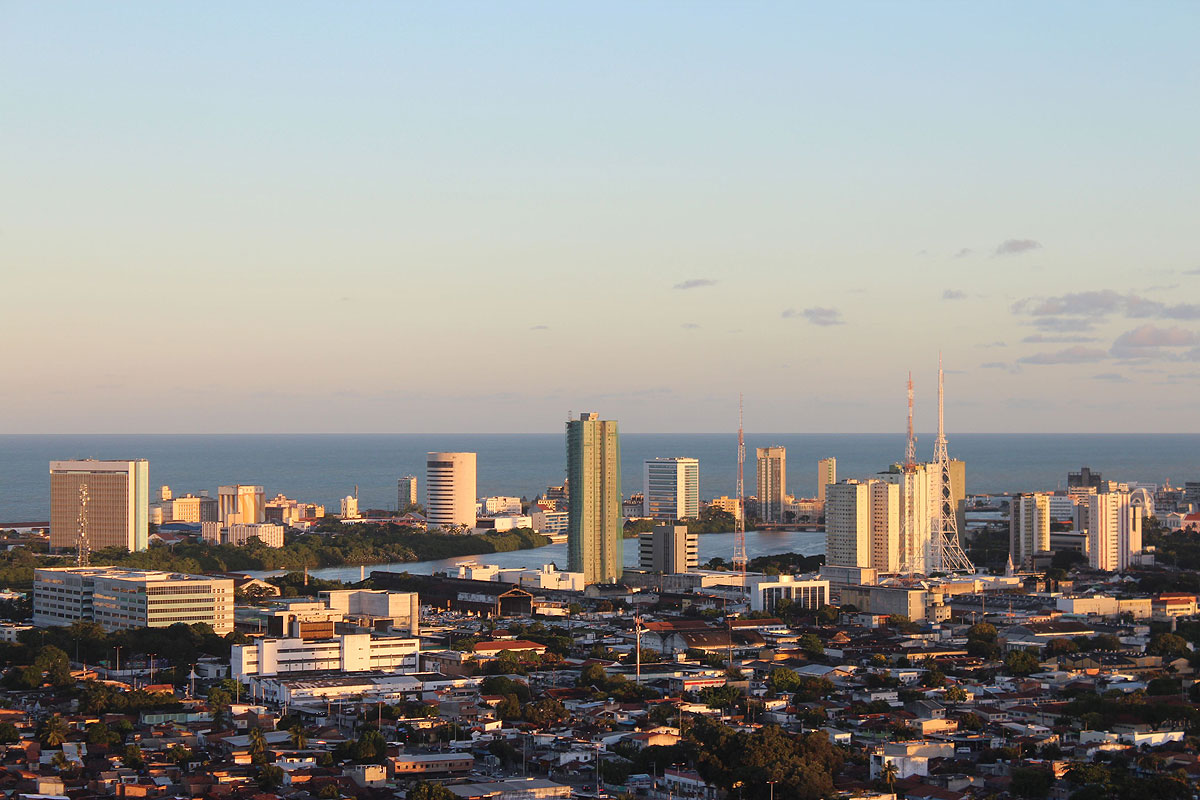 Imagem Parcial do bairro de Santo Amaro, na cidade de Recife, em Pernambuco 2017